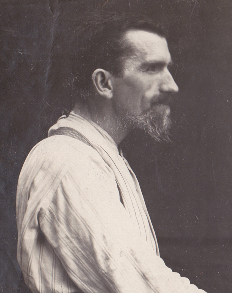 Louis-Albert Carvin, sculpteur français (1875-1951).